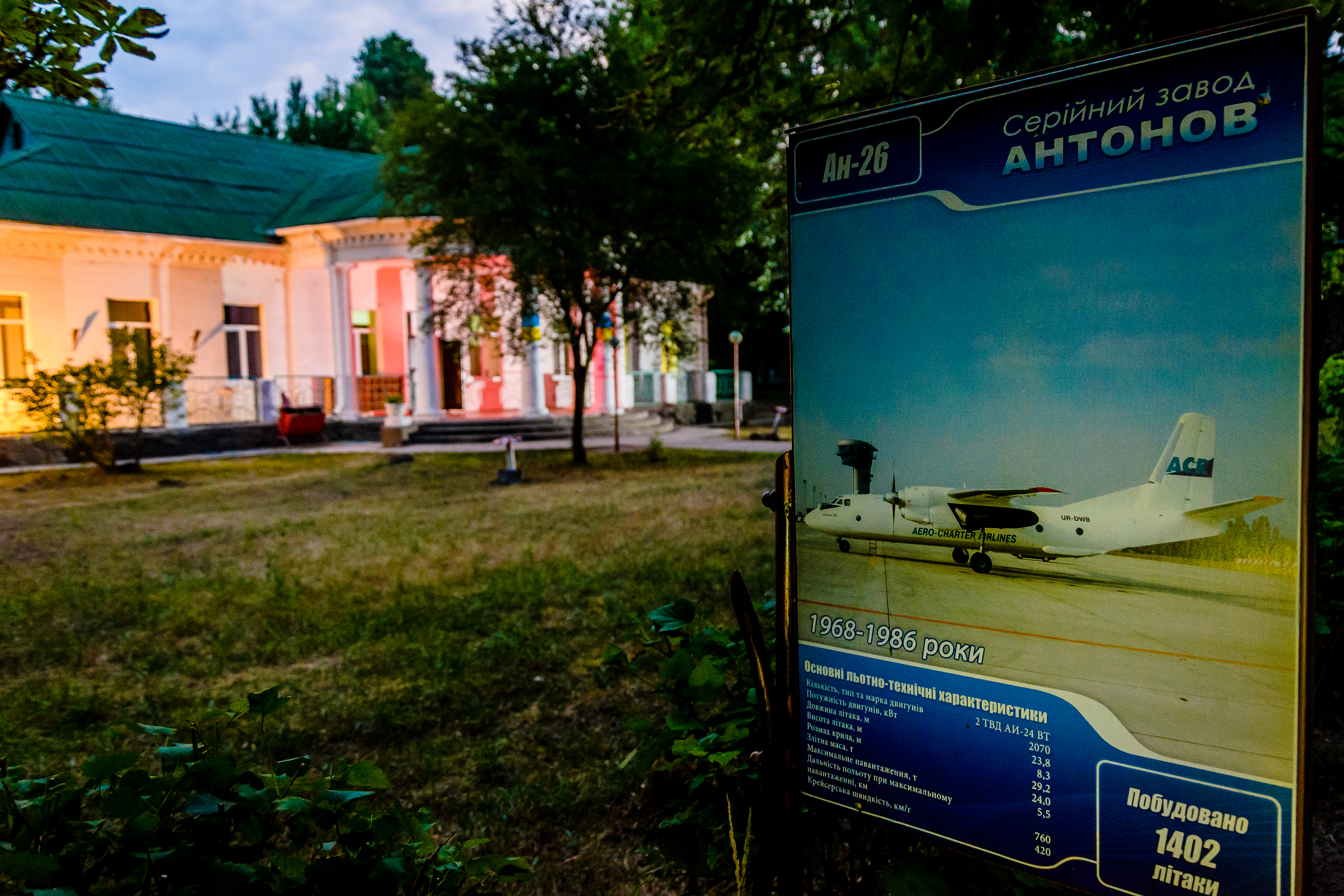 Територія комплексу